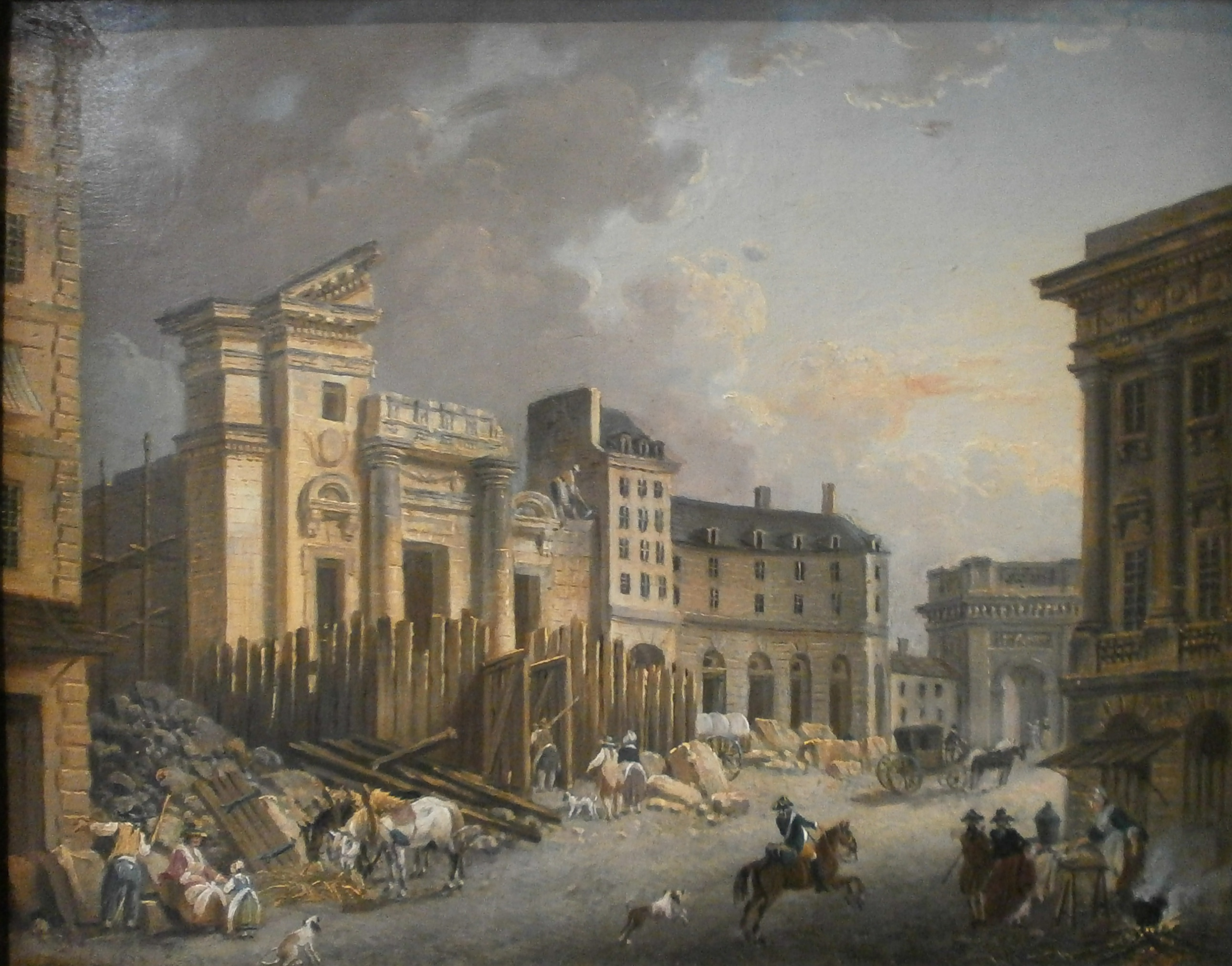 Démolition de l'église Saint-Barthélemy, sur l'île de la Citétitle QS:P1476,fr:"Démolition de l'église Saint-Barthélemy, sur l'île de la Cité" label QS:Lfr,"Démolition de l'église Saint-Barthélemy, sur l'île de la Cité"